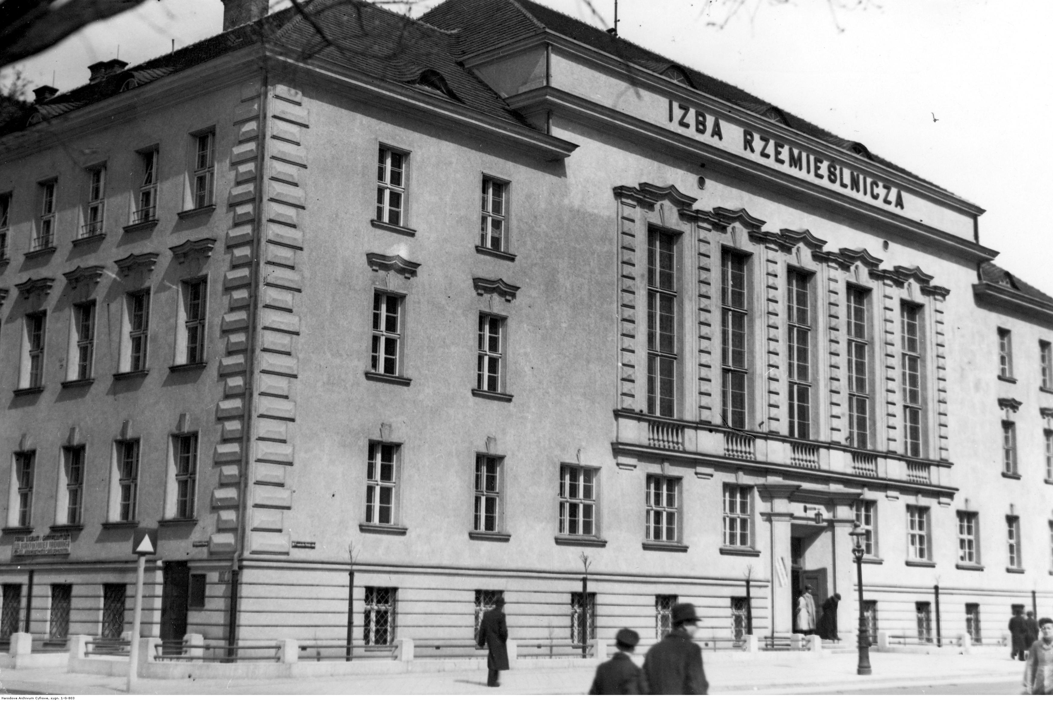 Budynek Izby Rzemieślniczej w Poznaniu, fotografia wykonana między 1927 a 1939